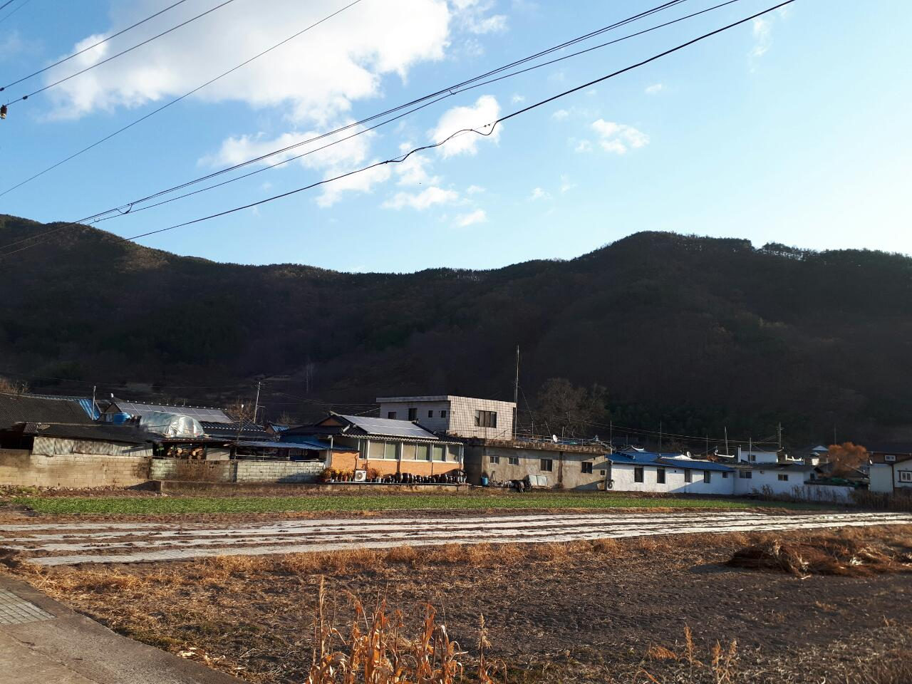 상정 마을 전경